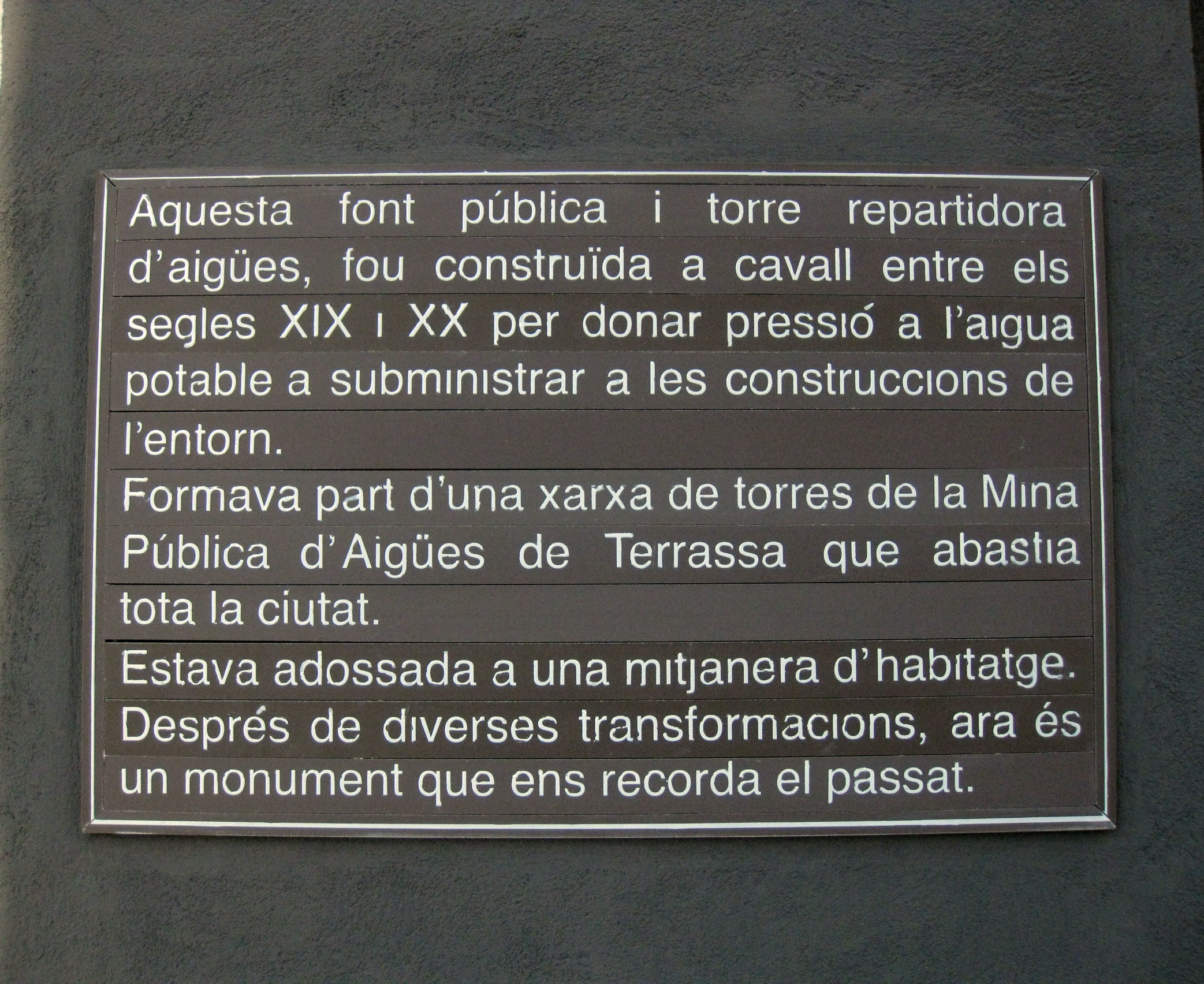 Torre de la Mina Pública i Font de les Quatre Cantonades, a la cantonada entre les carreteres de Rubí i de Montcada (Terrassa). Abans estava adossada a un edifici del començament de la carretera de Rubí, però en construir-se els nous pisos que es veuen darrere fou recol·locada a la cruïlla de les carreteres, exempta. A la imatge, placa explicativa col·locada a la part posterior de la torre.